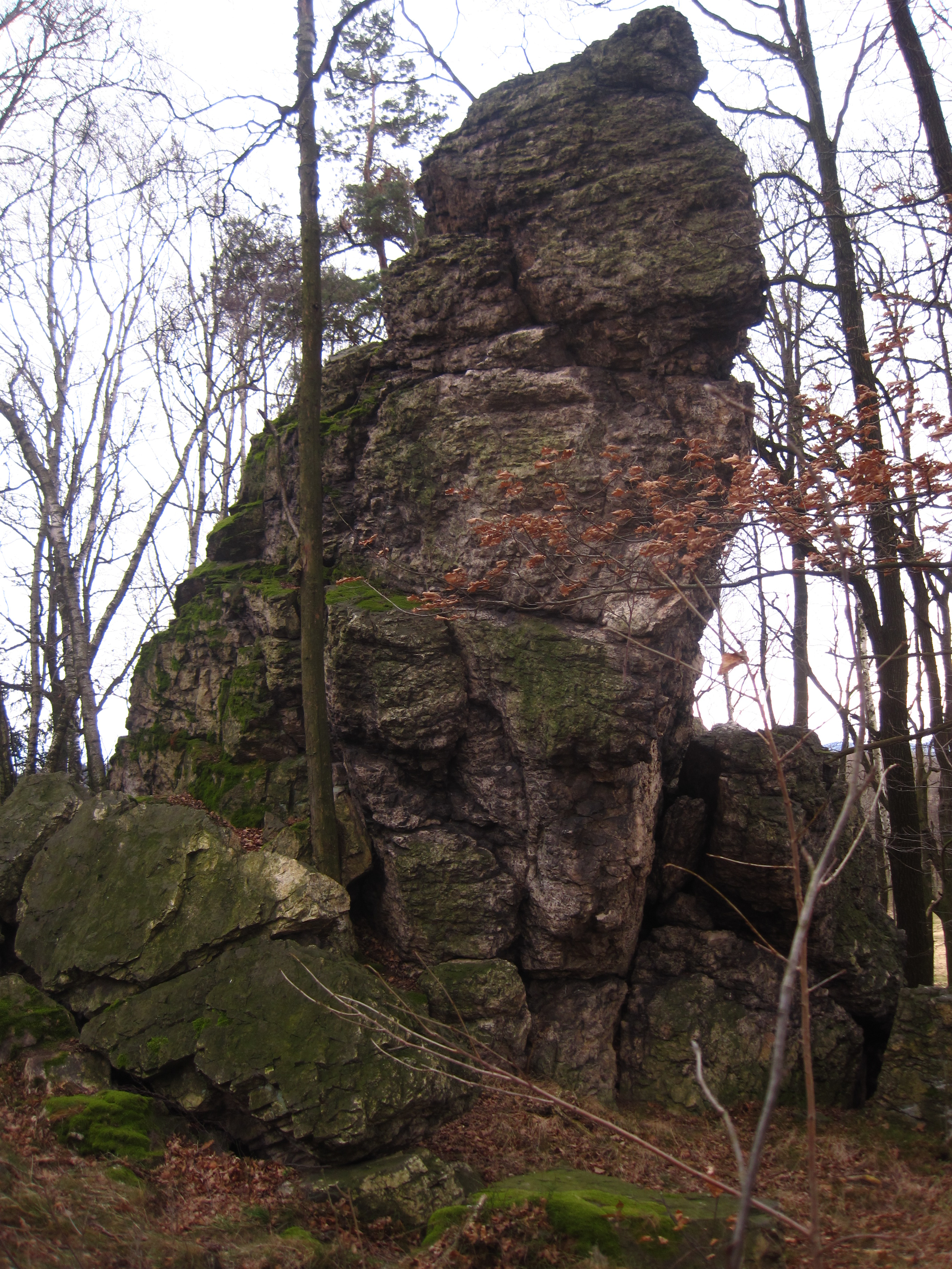 Přírodní památka Bílá skála severozápadně od vesnice Srbská chrání skalní hřebínek tvořený vypreparovanou křemennou žílou při státní hranici s Polskem.